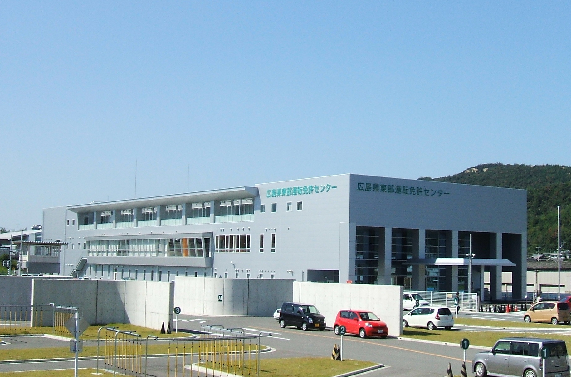 広島県福山市にある広島県東部運転免許センターの庁舎